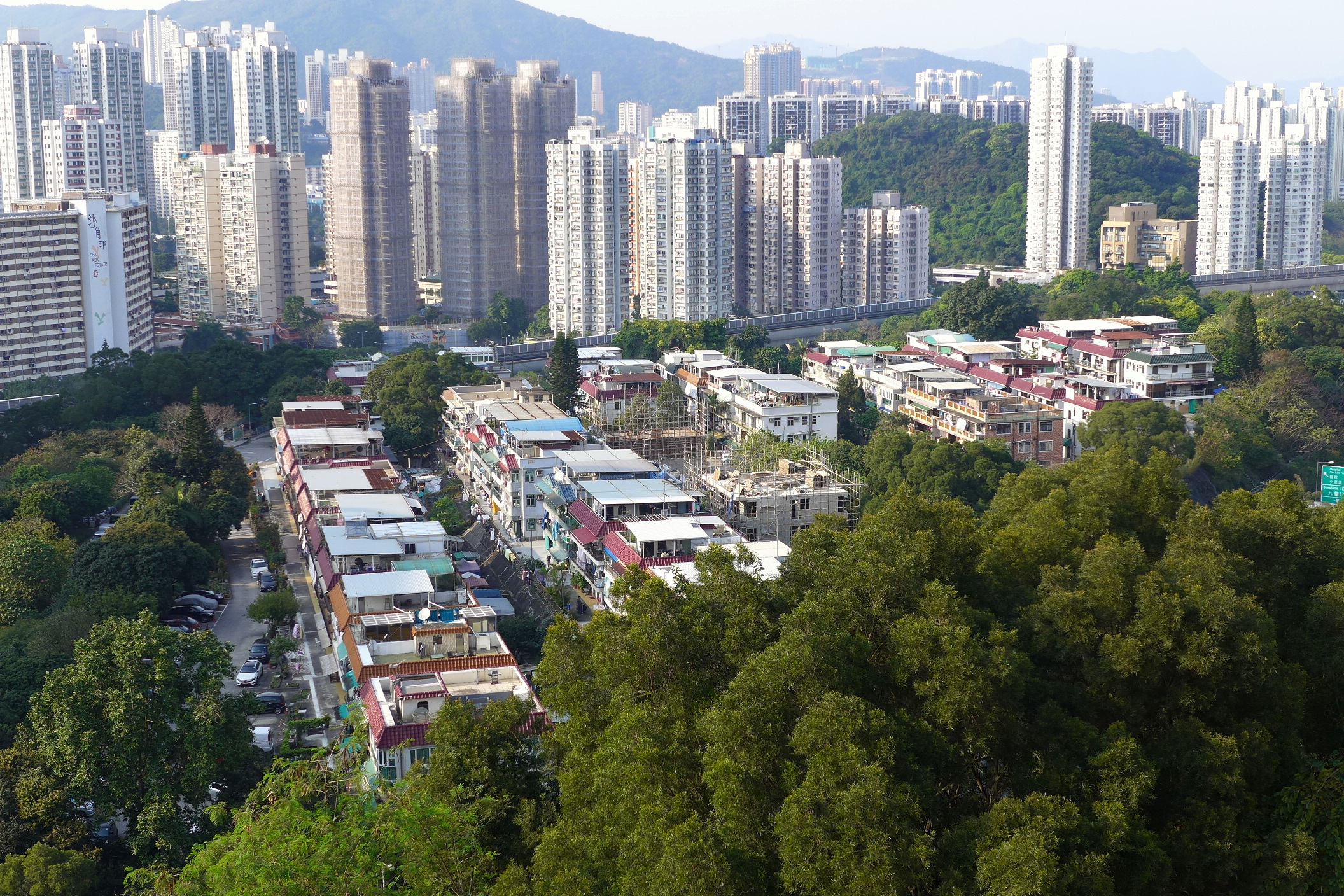 Fui Yiu Ha New Village